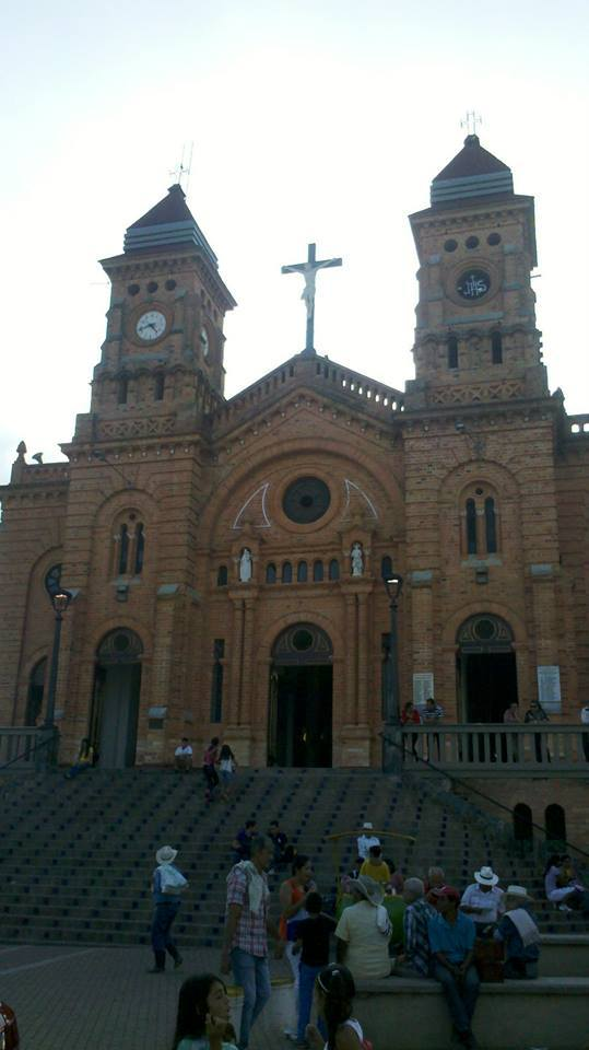 Esta fotografía fue tomada en el municipio colombiano con código 05890.